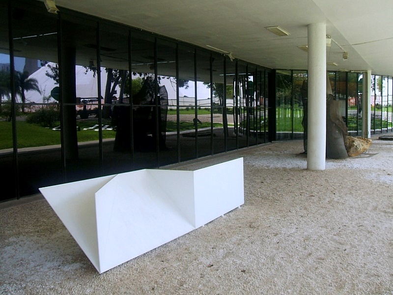 Fachada do Museu de Arte Moderna de São Paulo, no Parque do Ibirapuera, com escultura de Antonio Lizárraga.